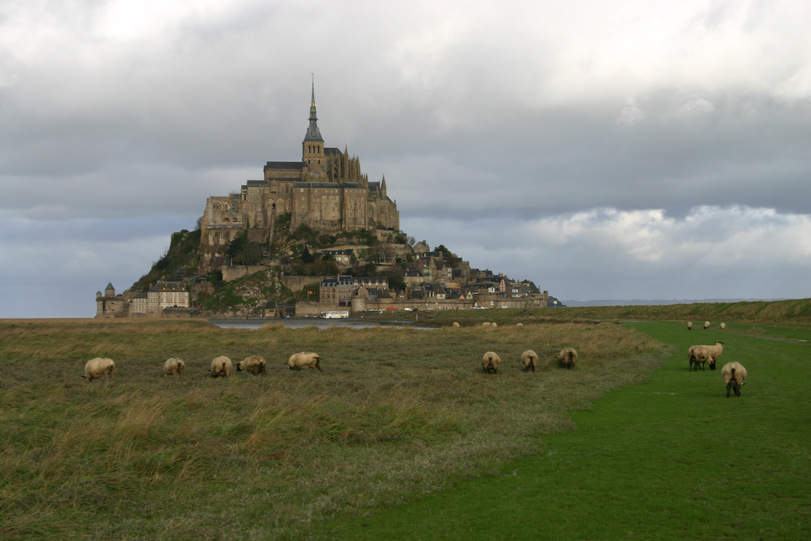 Le Mont Saint-Michel et ses brebis du pré salé